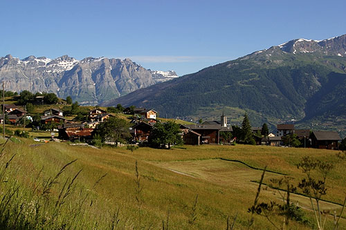 Oberems (Turtmanntal)